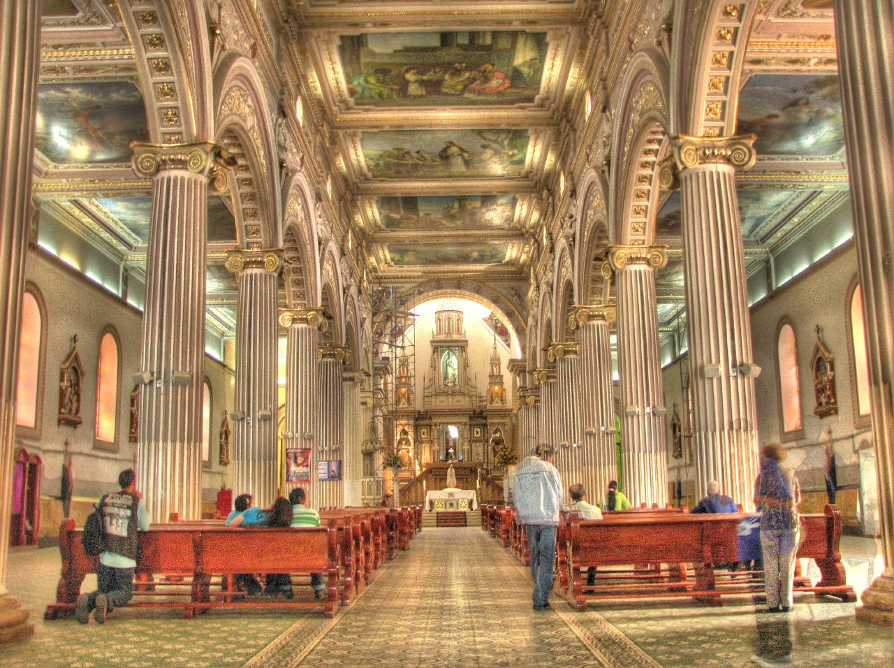 Basílica de San Pedro. Antioquia, Colombia.basilica de san pedro, antioquia